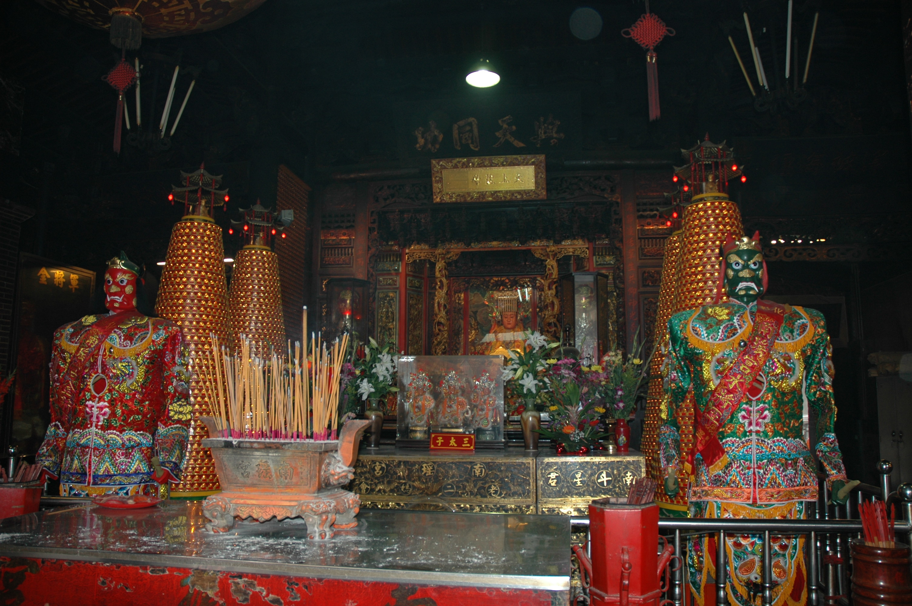 中文（台灣）: 彰化南瑤宮1